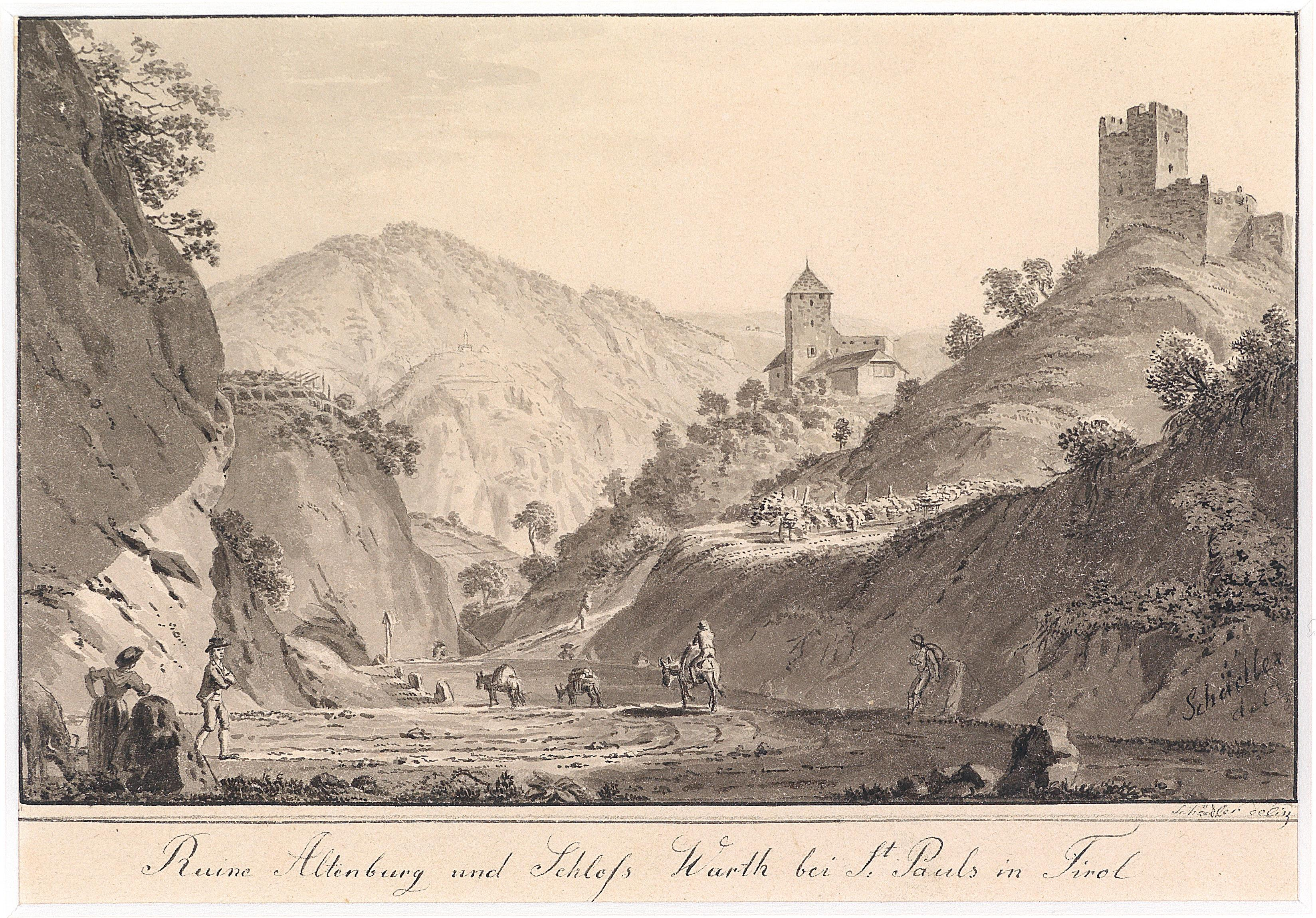 Ruine Altenburg und Burg Warth bei St. Pauls in Südtirol, betitelt, signiert Schödler del., Grisailleaquarell auf Papier, 10 x 14 cm, Österreich, um 1820